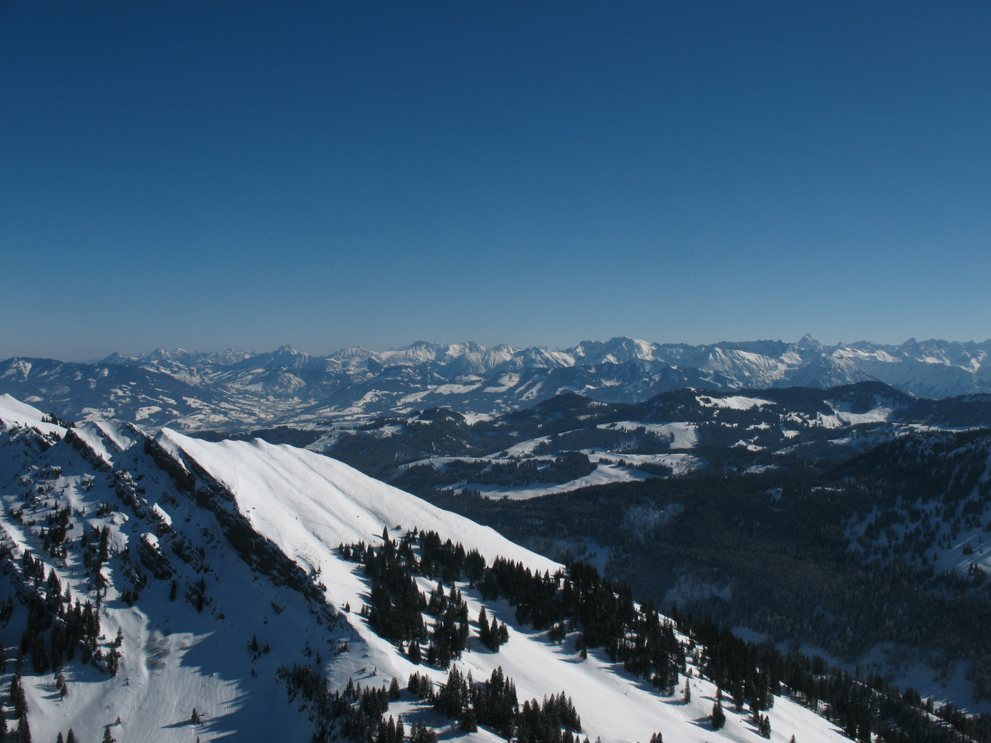 Blick vom Rindalphorn (1821 m) auf den Gündleskopf (1748 m) und die Allgäuer Alpen.